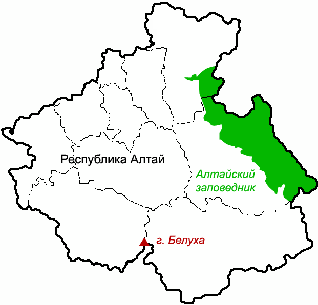 Расположение Алтайского заповедника в Республике Алтай